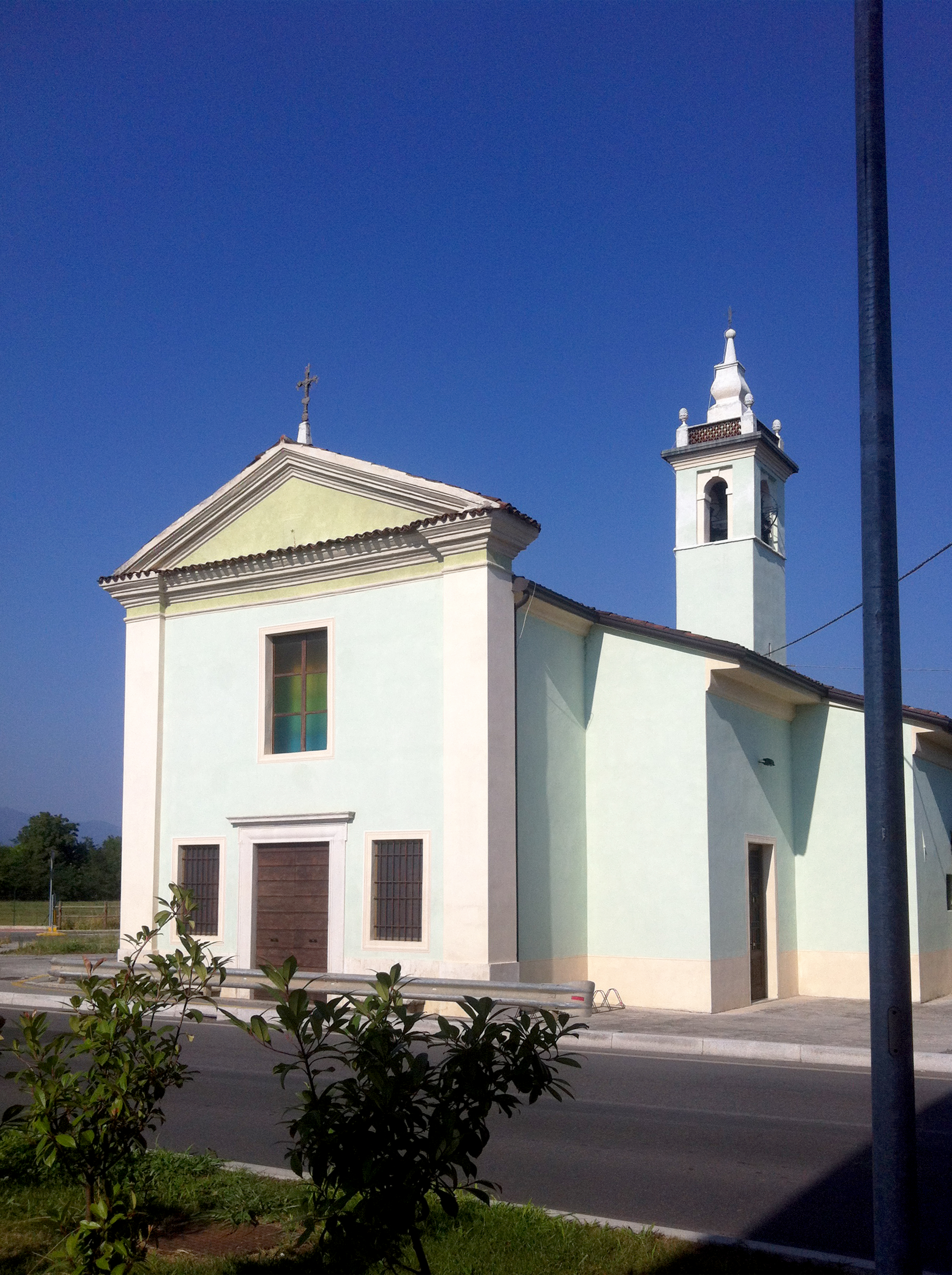 Chiesa della Santissima Trinità Borgosatollo